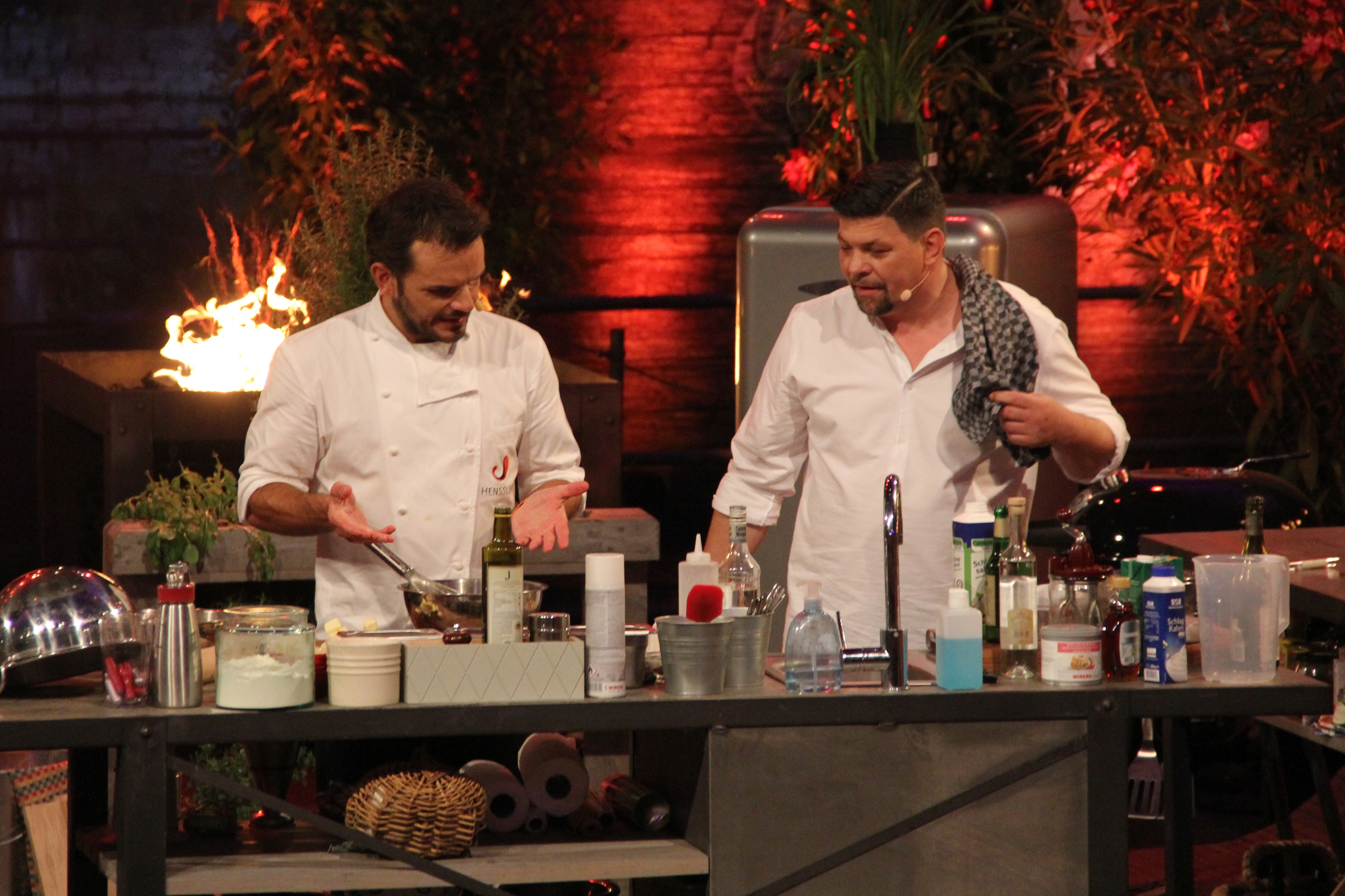 Steffen Henssler und Tim Mälzer bei Grill den Profi Sommerspecial am 20.07.2018 in Magdeburg